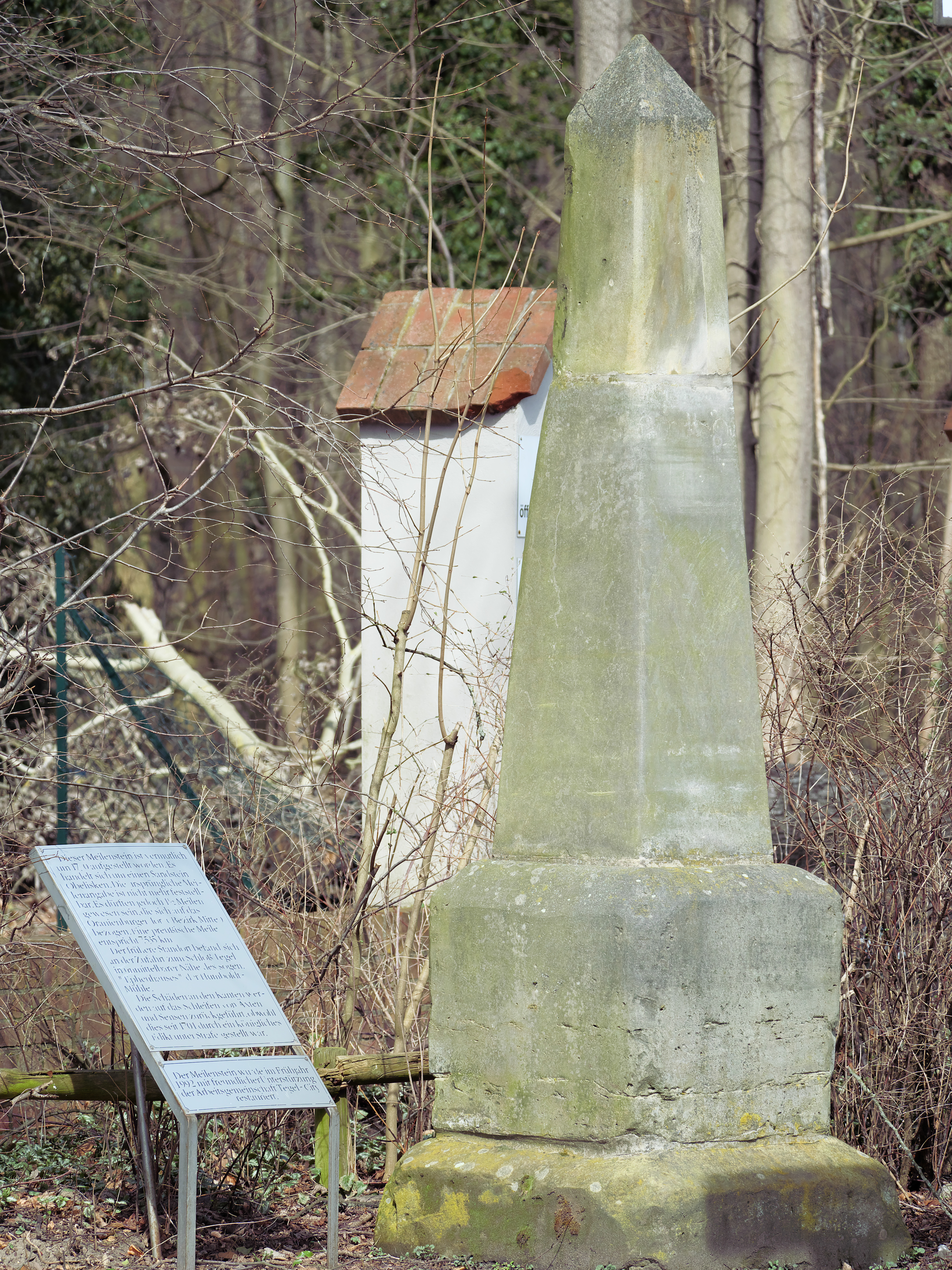 Preußischer Meilenstein, Anfang 18. Jahrhundert, am Schloss Tegel in Berlin, zwei preußische Meilen (gut 15 Kilometer) bis zum Poststein in Berlin-Mitte (Dönhoffplatz)